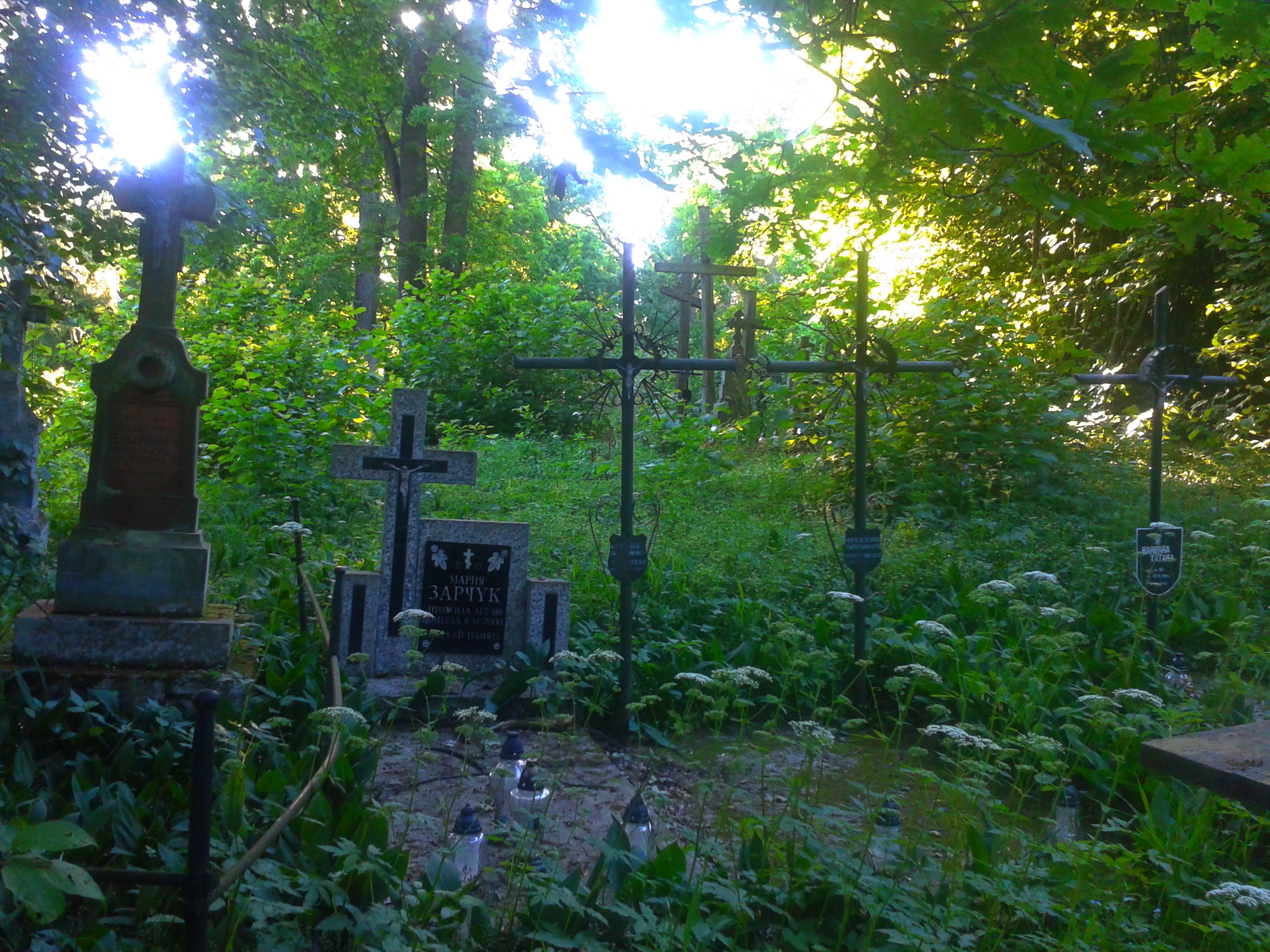 Cmentarz prawosławny w Wyrykach-Adampolu